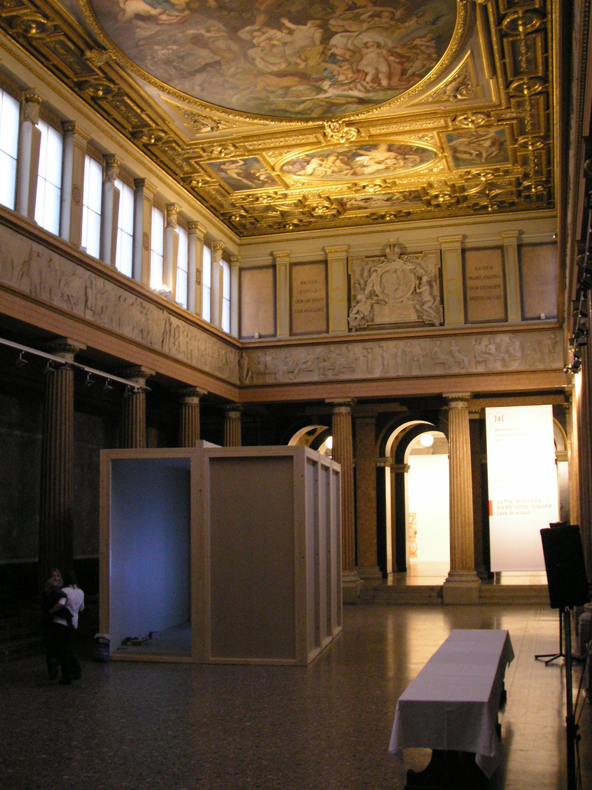 Interior of the Akademie der bildenden Künste in Vienna, on Schillerplatz